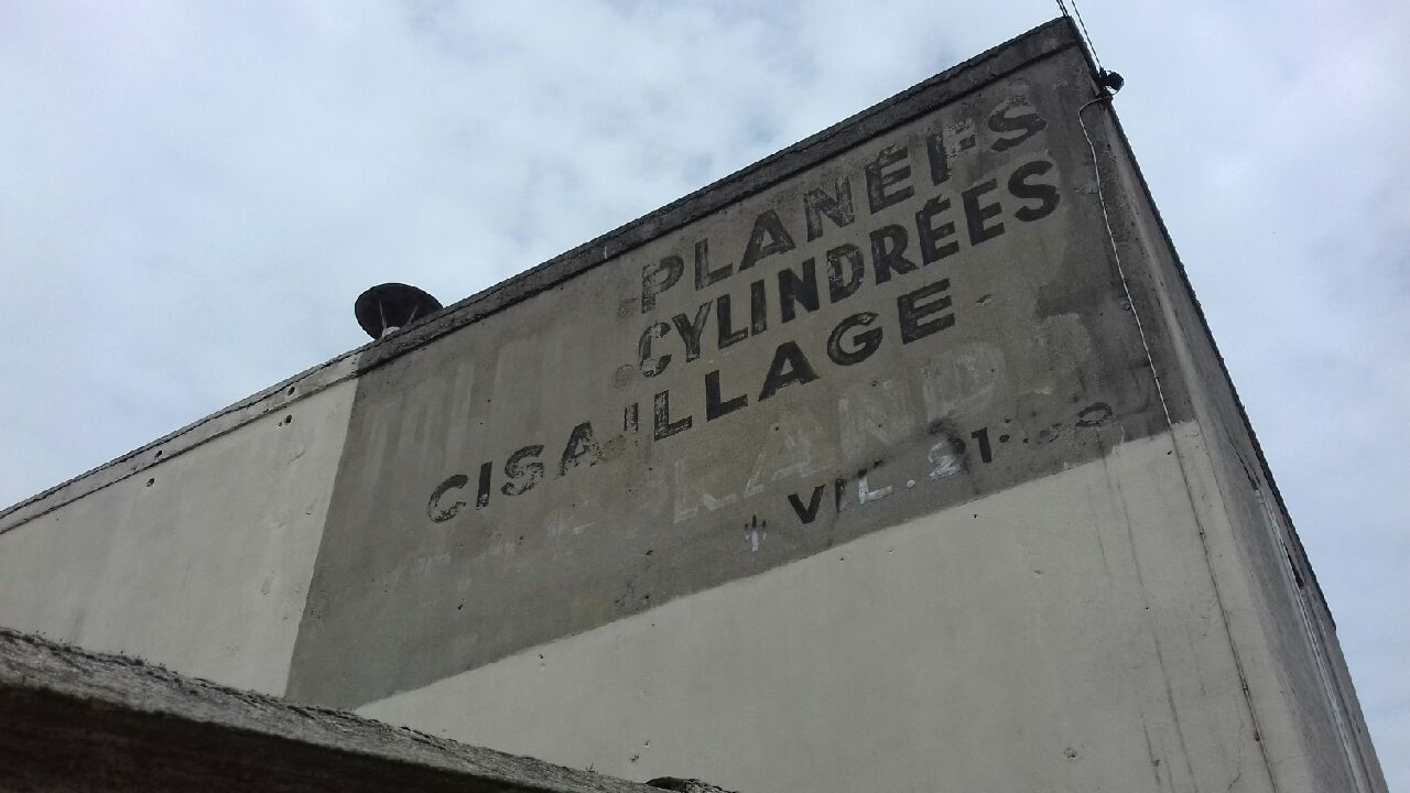 Ancienne inscription publicitaire. Romainville (Seine-St-Denis), 153-155 avenue Gaston Roussel